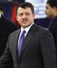 King Abdullah II of Jordan